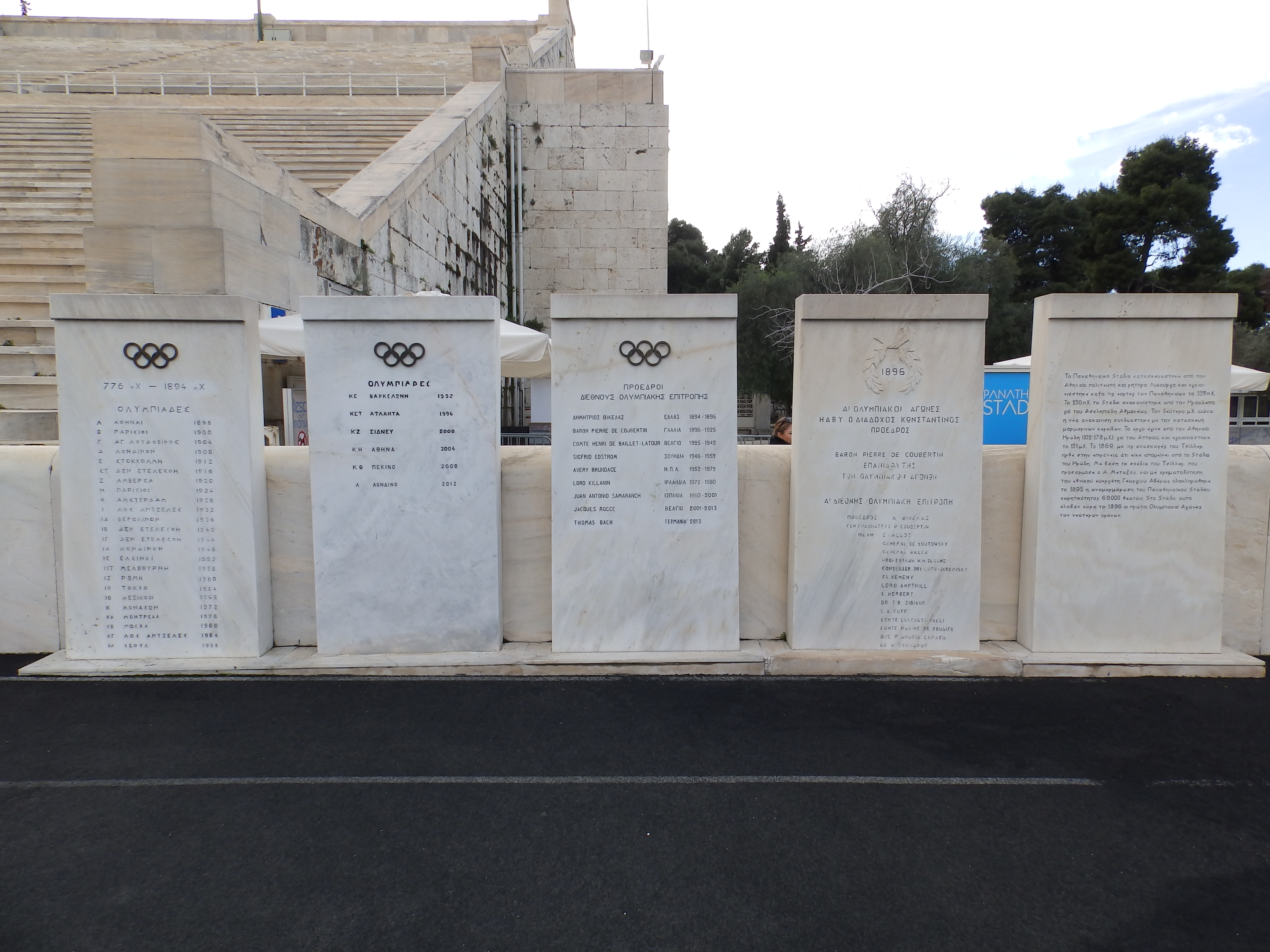 Das Panathinaiko-Stadion im Jahr 2014